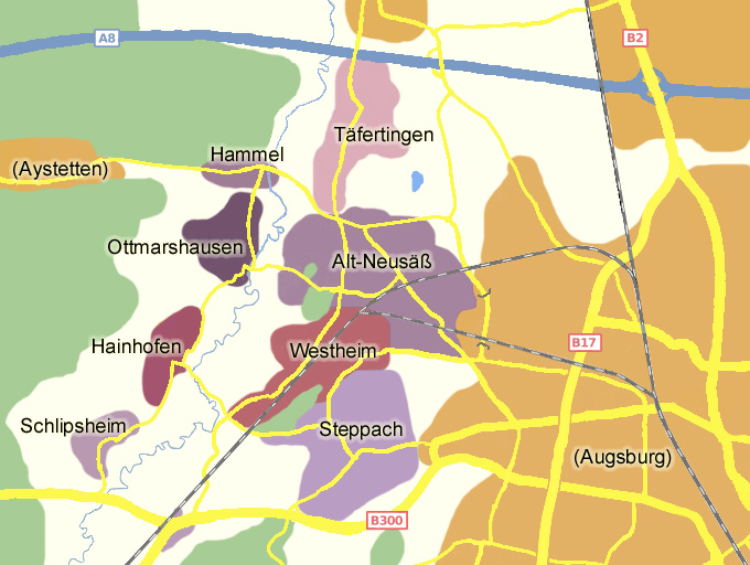 Karte von Neusäß mit seinen acht Stadtteilen.